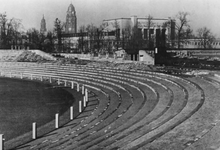 Dresden, Ilgenkampfbahn Illus Ka Elbebild 6.3.51 Dresden im Wiederaufbau. Die durch anglo-amerikanische Bomber schwer zerstörte Innenstadt Dresdens wird künftig ein neues Gesicht erhalten. Große Bauvorhaben wurden bereits in Angriff genommen. bis zum 1.Mai 1951 wird Dresden eine weitere neue Sportanlage, die Ilgenkampfbahn, erhalten. UBz: Blick auf die im Bau befindliche Ilgenkampfbahn (in der Nähe des Hygiene-Museums.)